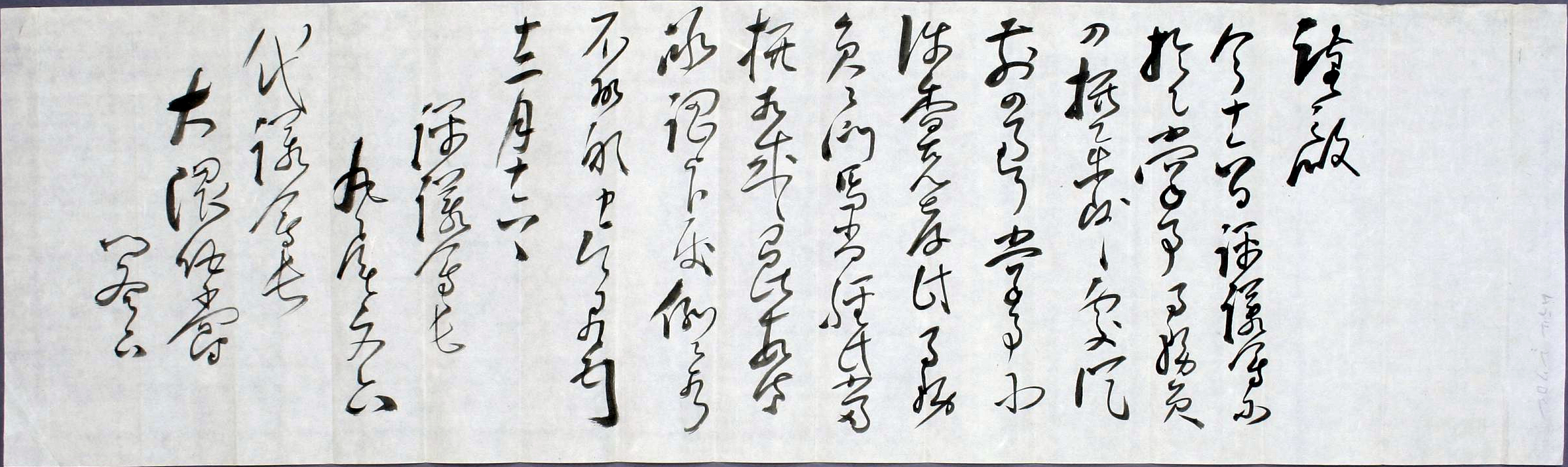 「丸尾文六書翰――大隈伯爵」12月16日。